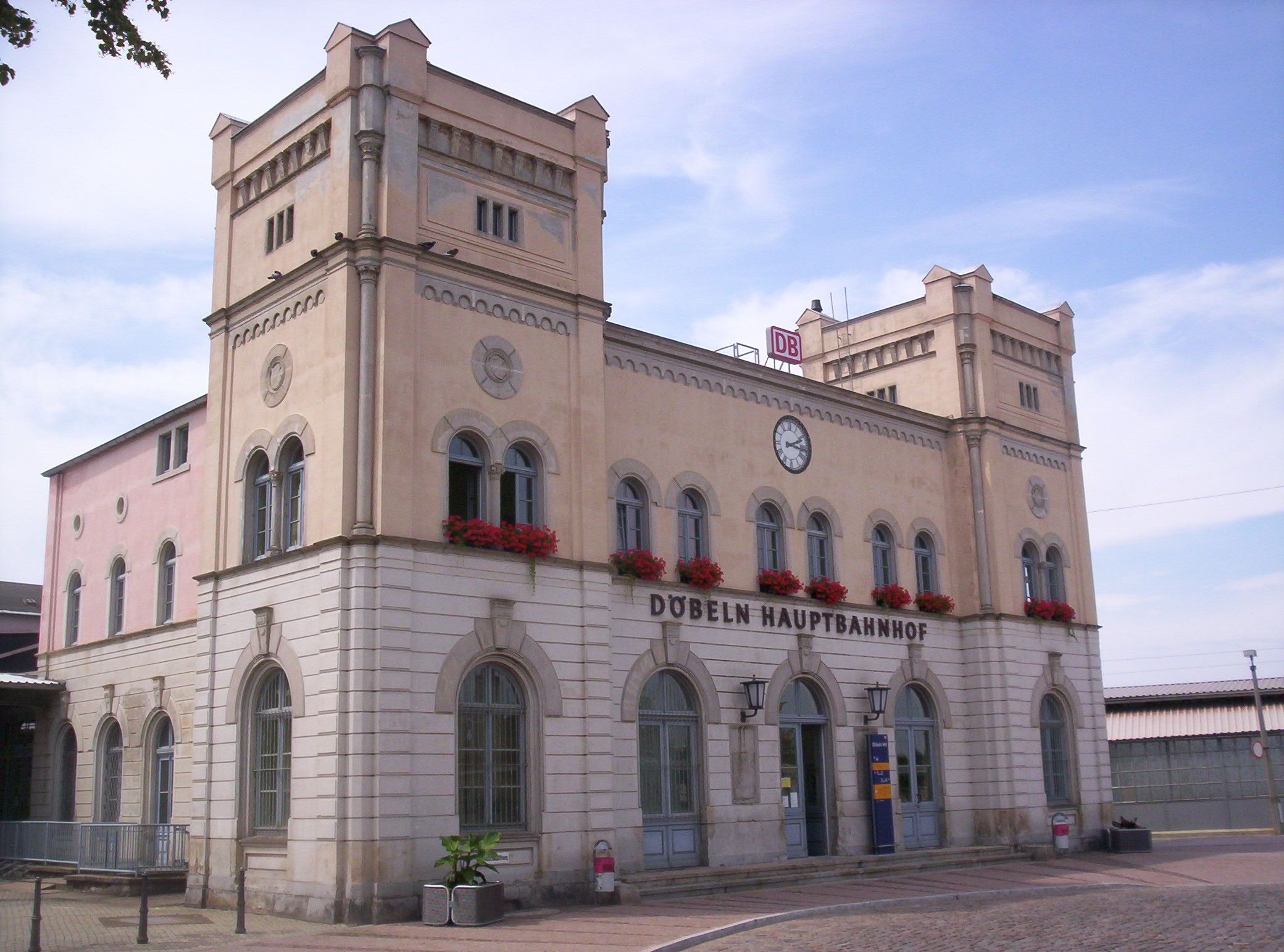 Döbeln Hbf, Sachsen, Deutschland